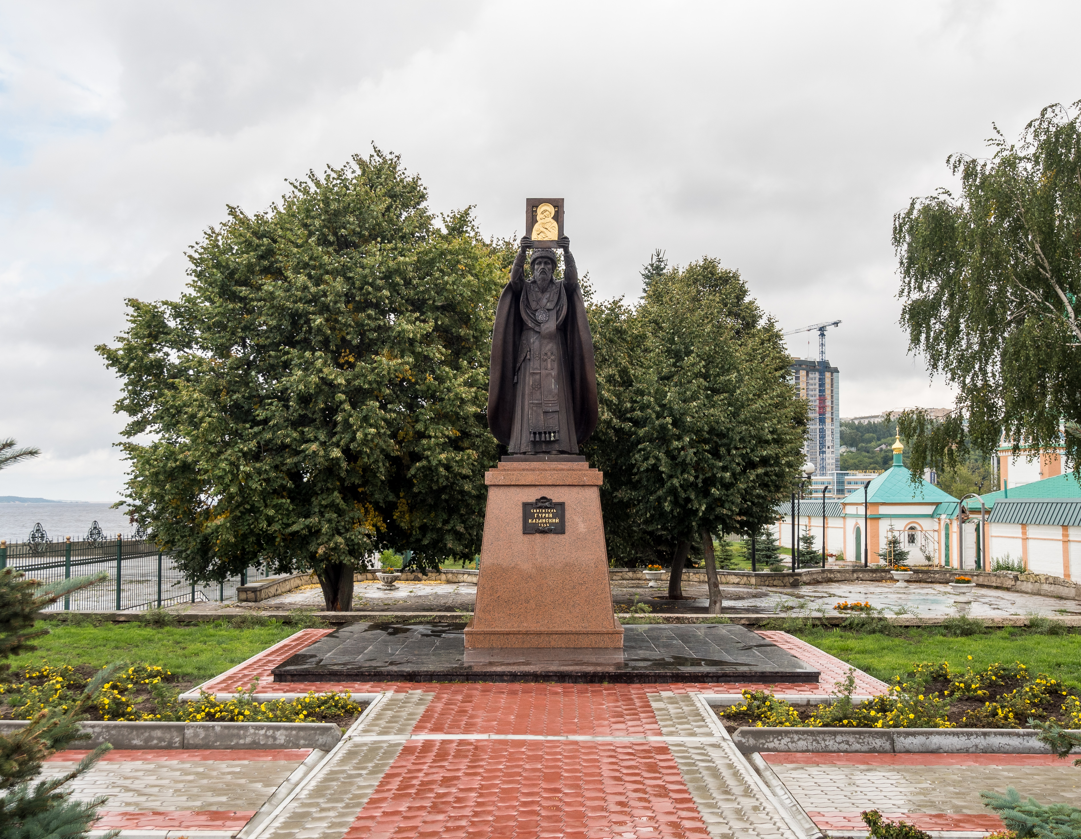 Памятник святителю Гурию Казанскому возле Троицкого монастыря в Чебоксарах. Надпись "святитель Гурий Казанский. 1555"